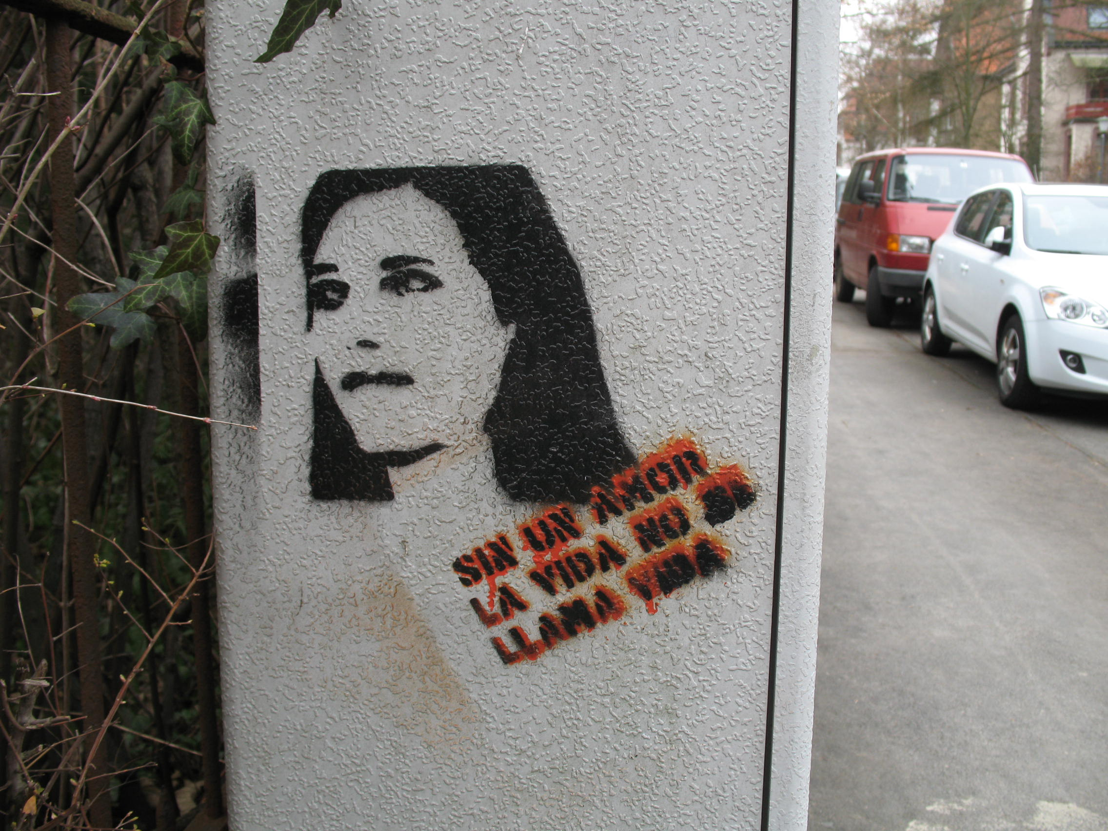 Spanische Streetart. Sinngemäß: Ohne eine Liebe, ist das Leben kein Leben